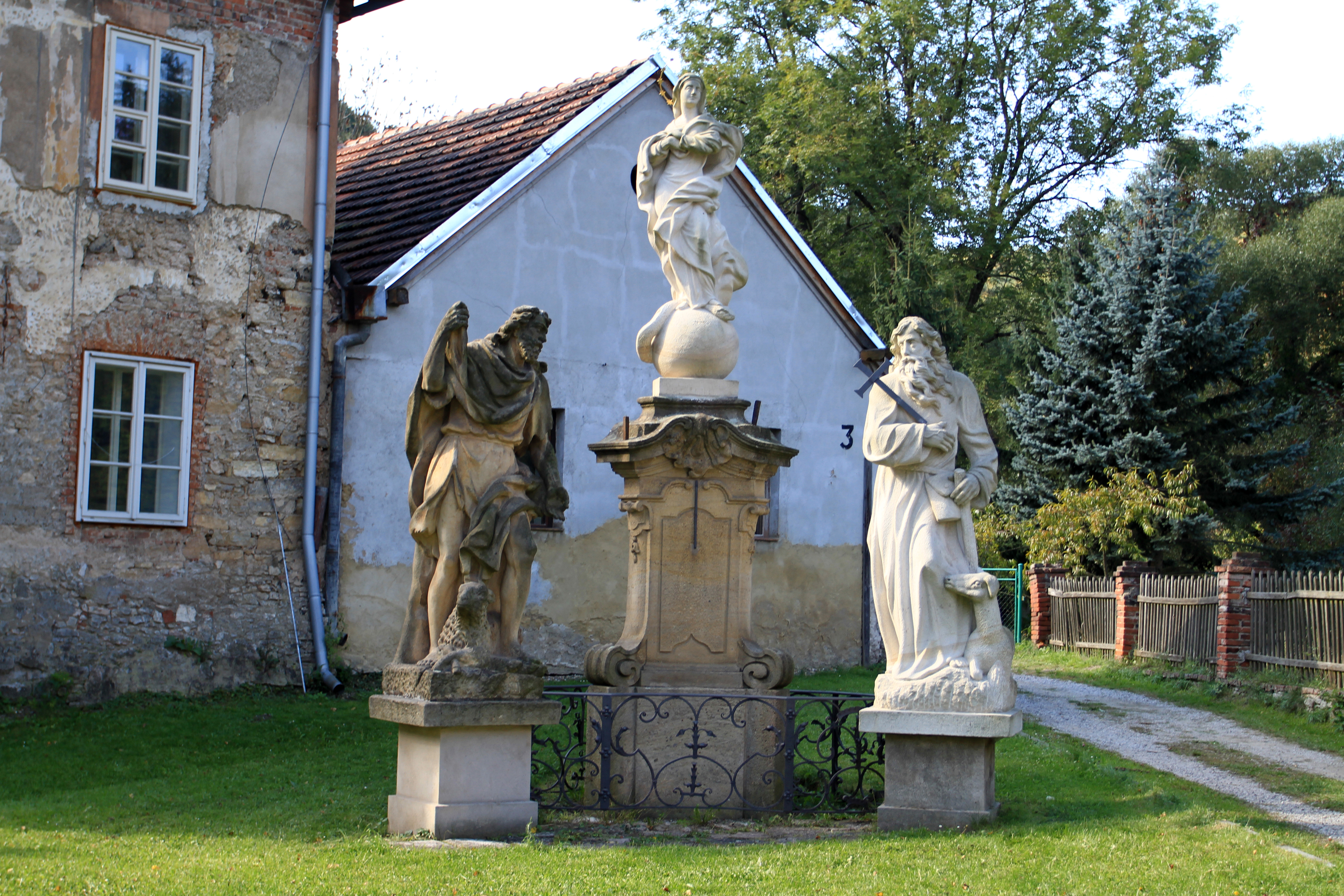 Sousoší P. Marie (Svatý Jan pod Skalou), u silnice proti faře, Svatý Jan pod Skalou